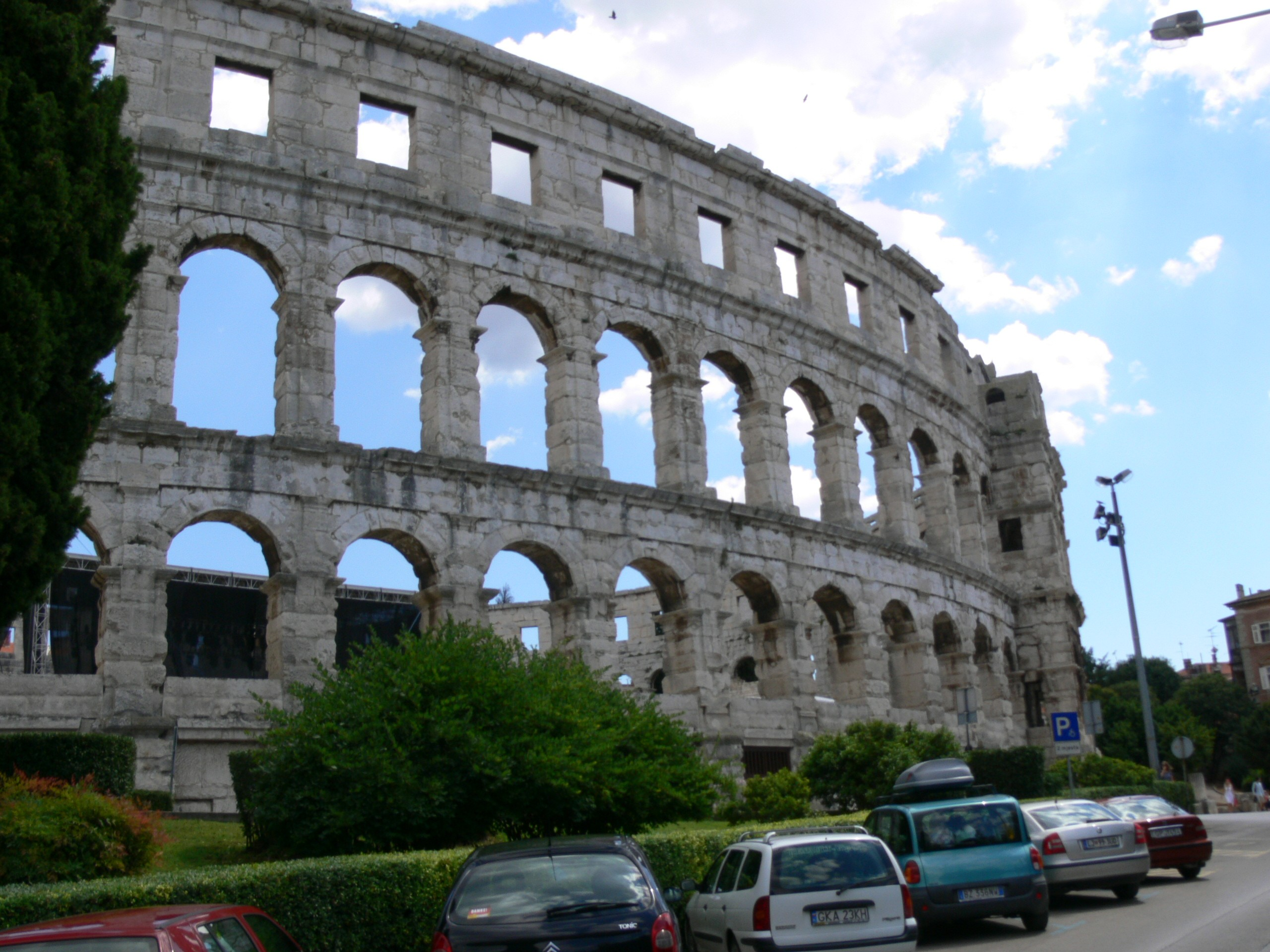 Arênes de Pula (Istrie)(Croatie), photo Jean Plançon 2006.